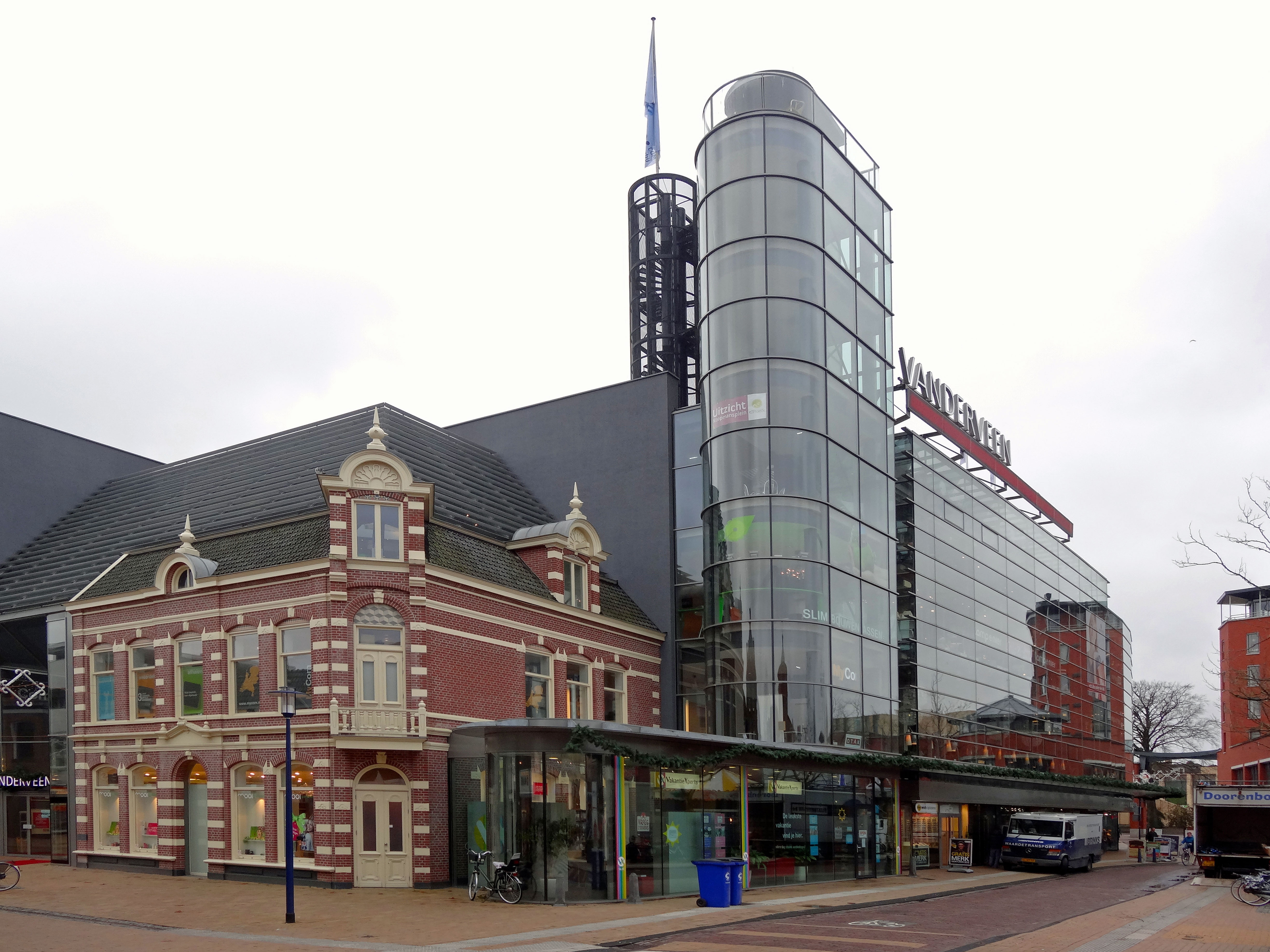 Zicht op het warenhuis Vanderveen in Assen - Koopmansplein